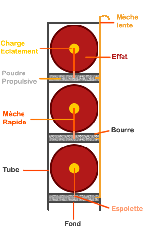 Schema d'une chandelle de feu d'artifice